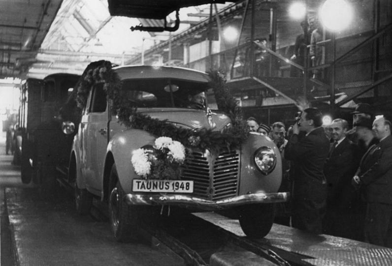 ADN-ZB/Illus-dpd DER ERSTE "FORD TAUNUS" LAEUFT VOM BAND Am 23. November 1948 lief im Rahmen eines schlichten Festaktes in den Koelner Fordwerken der erste "Ford-Taunus 1948" vom Fließband, der gegenüber seinem Vorgänger erhebliche Verbesserungen in der Federung und bezgl. des Motors aufweist. Ein neuer Vergaser hat den Brennstoffverbrauch auf 7,6 Liter fuer den 1,2-Vierzylinder-Reihenmotor herabgesetzt. Bei einer Durchschnittsreisegeschwindigkeit von 85 Kilometern erreicht der neue Ford-Taunus eine Spitzenleistung von 110 Stundenkilometern. Unser Bild zeigt den ersten festlich geschmuekten Ford-Taunus 1948 am Ende des Fließbandes.